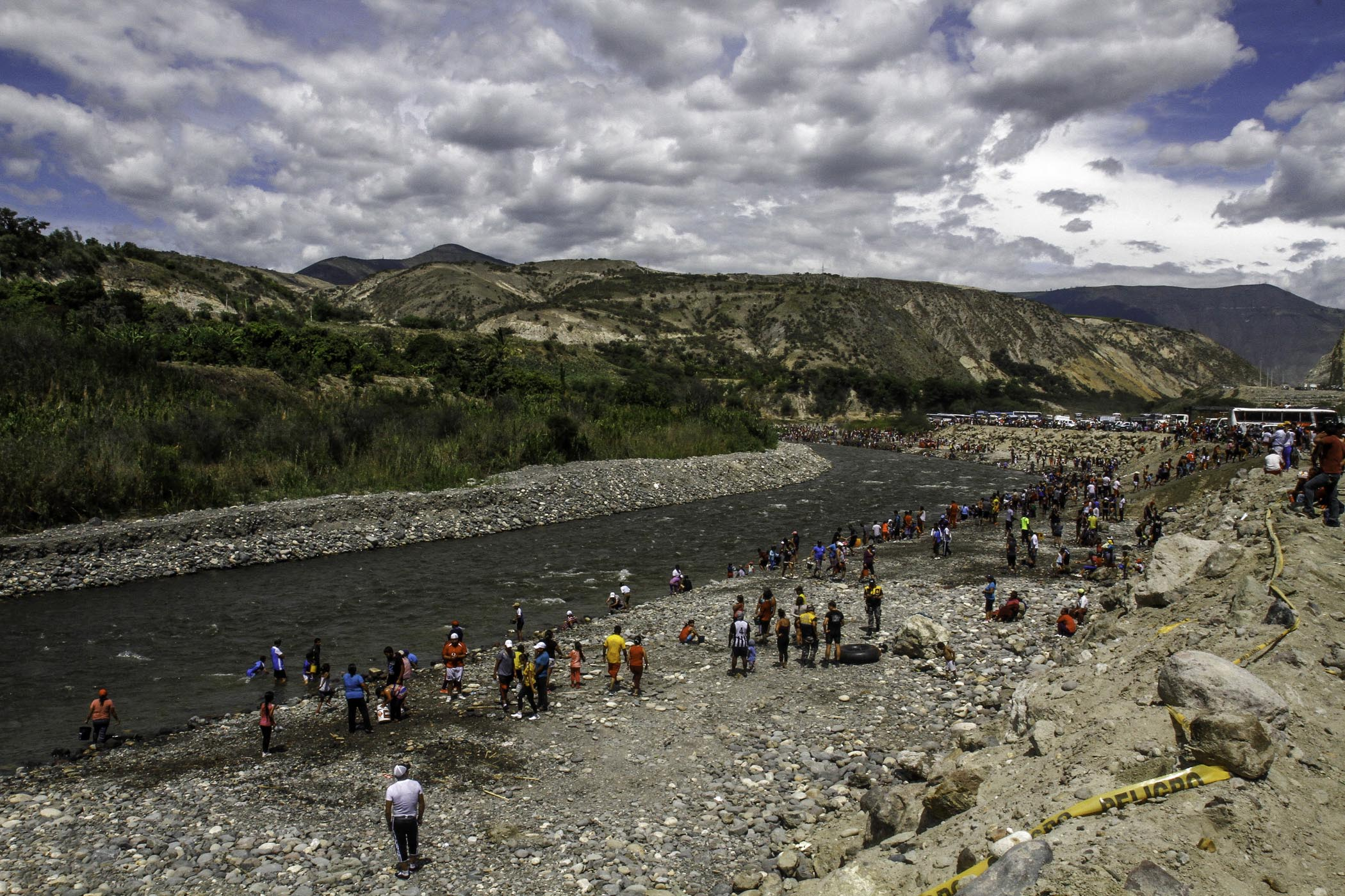 Valle del Chota (Imbabura), 17 feb (Andes).- Agua, sol, fiesta y alegría, los ingredientes del Carnaval de Coangue, que se desarrolla desde 2007 en la zona del Valle del Chota en el Valle del Chota, provincia de Imbabura (norte andino). Foto: Micaela Ayala V./ANDES